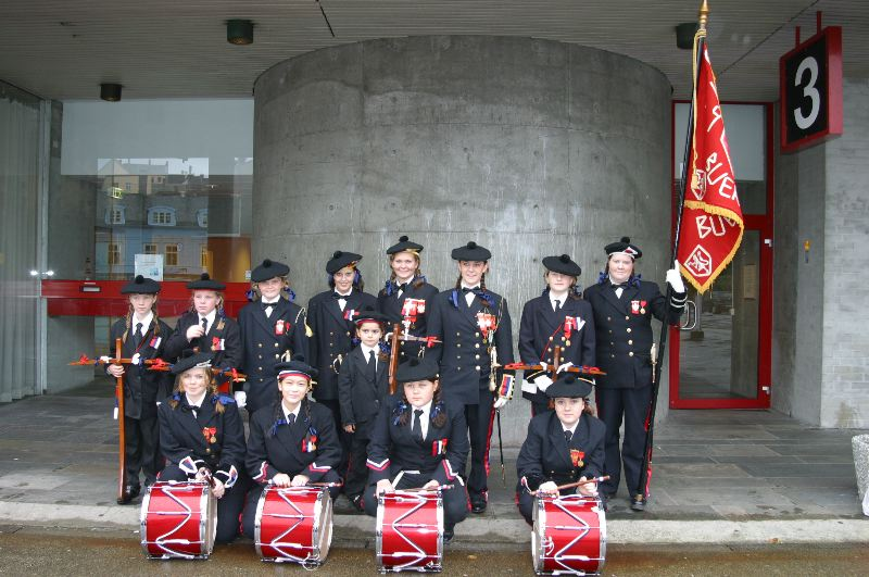 Lungegaardens Buekorps